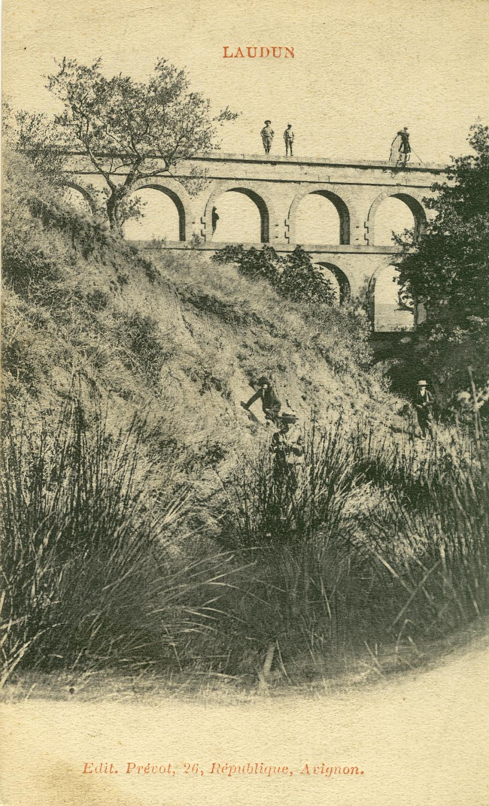 Laudun-l'Ardoise (Gard - France) - L'aqueduc de Balouvière (1870) au début du XXe siècle